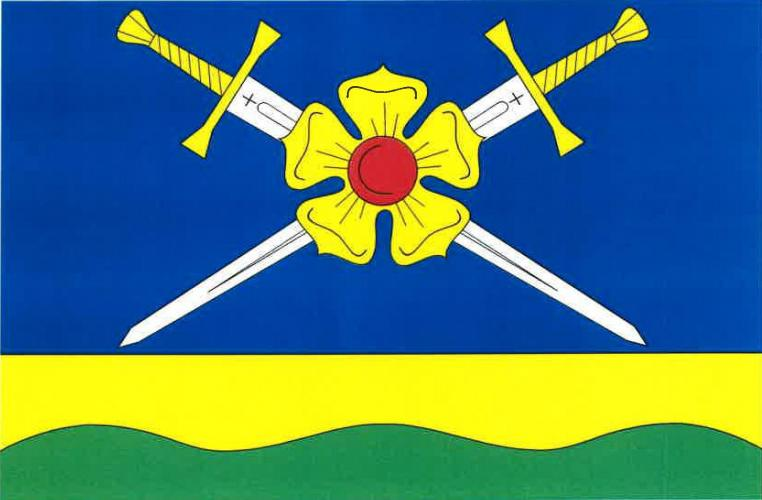 Pleše vlajka